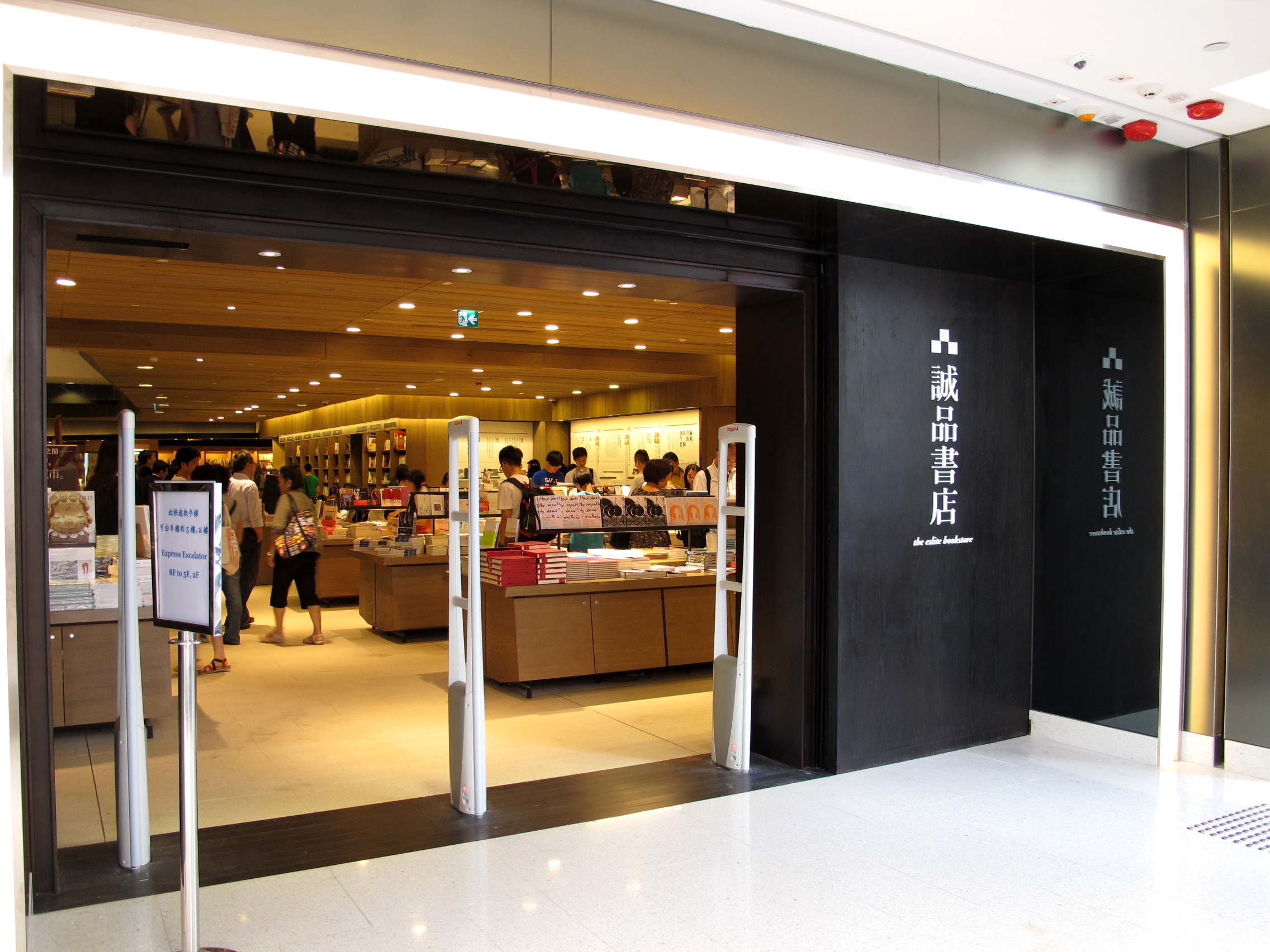 eslite in Hong Kong Hysan Place